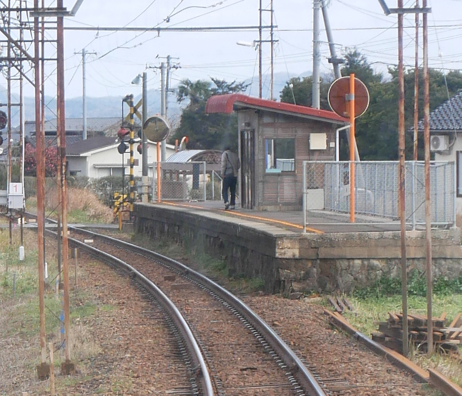 Midami Station (美談駅)